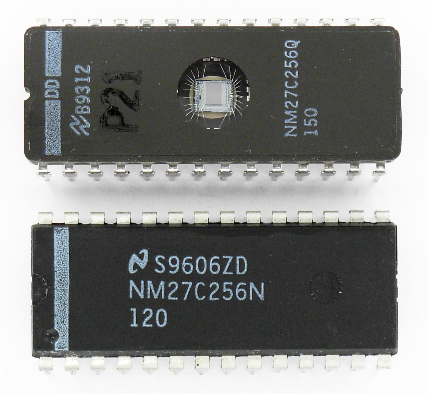 National NM27C256, EPROM 256kbit/32KB, oben Keramikgehäuse/UV-löschbar, unten Plastikgehäuse OTP